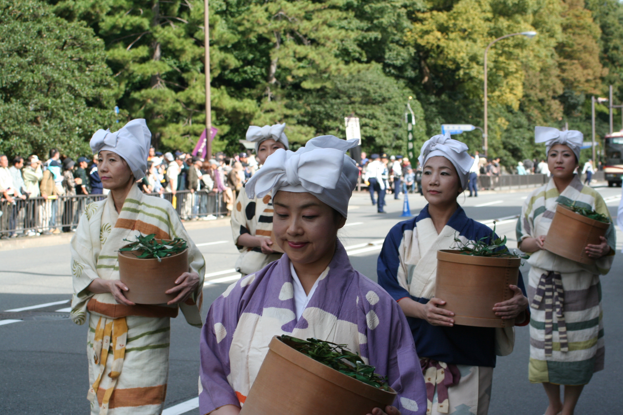 京都府京都市にて開催された時代祭。正午の御所から平安神宮までの行進の様子。2009年10月22日撮影。